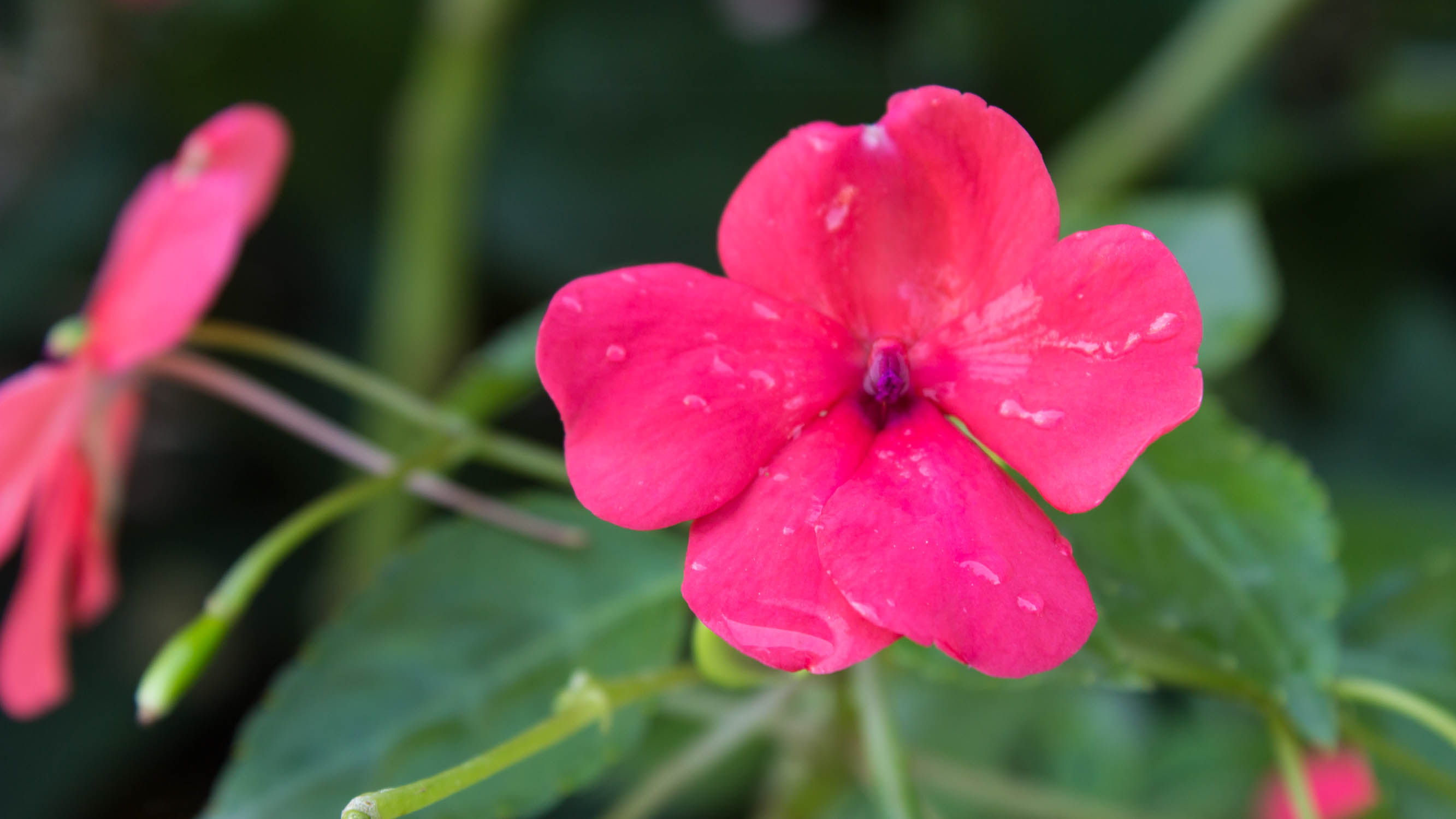 Bunga Tapak Dara Merah